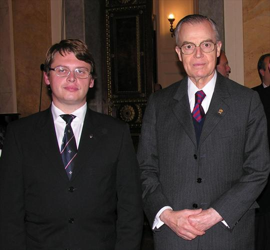 ベルトランド（右）とポーランド人神学者ノルベルト・ヴイトヴィチ.